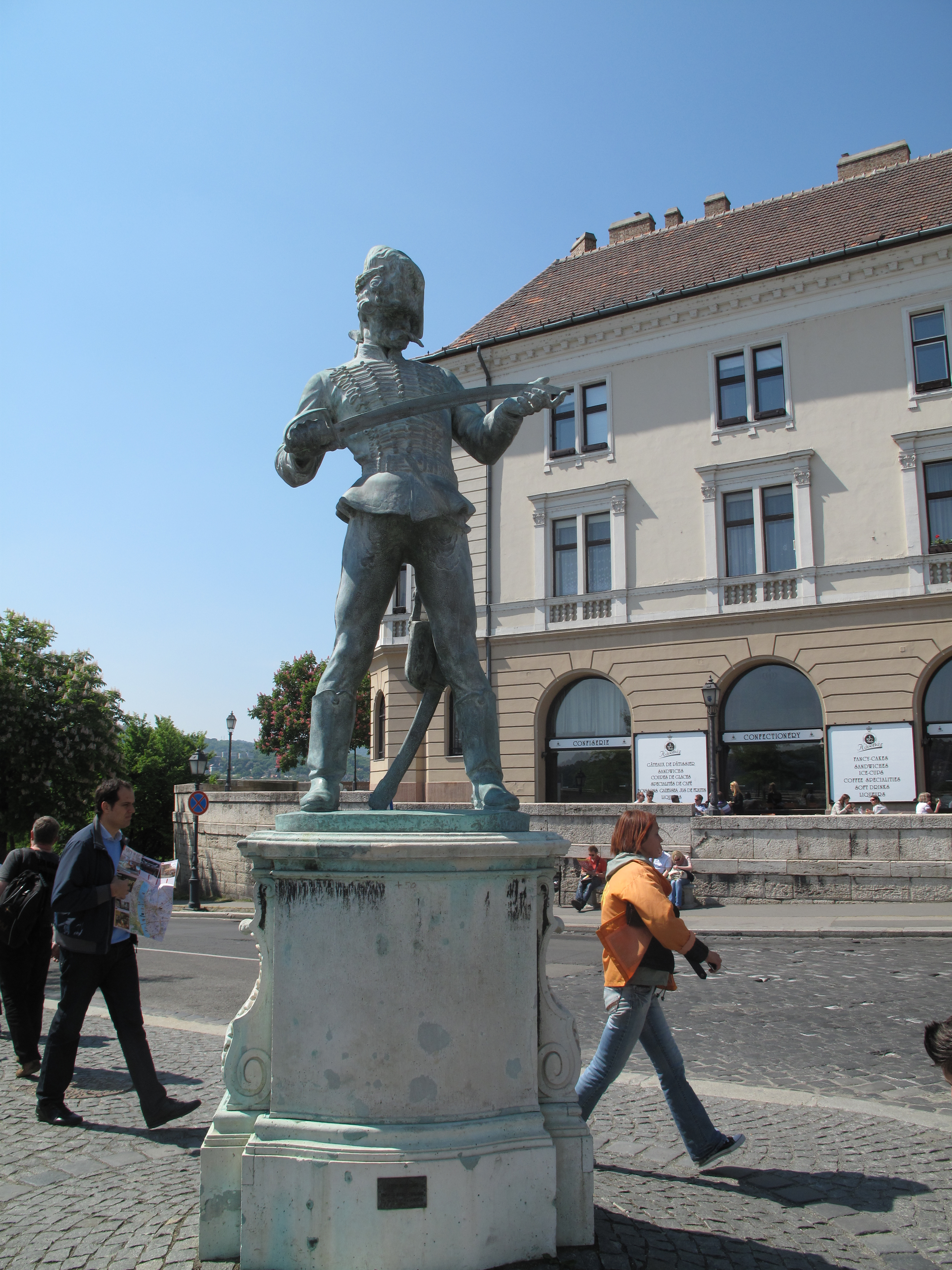 Budapešť